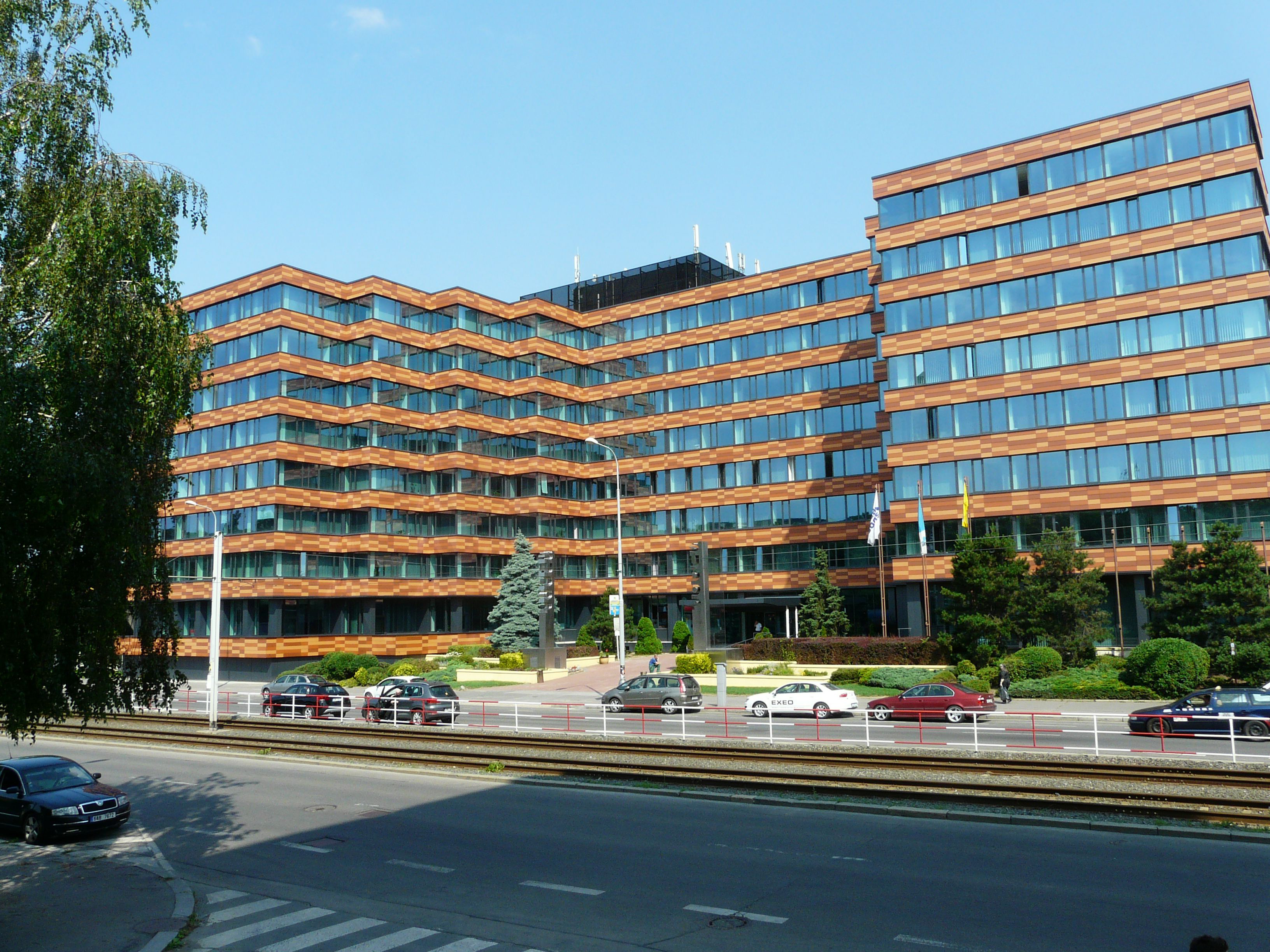 Sídlo firmy SUDOP PRAHA a.s. na Olšanské ulici v Praze 3